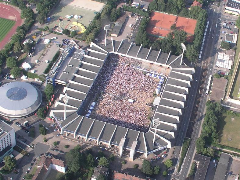 "Public Viewing im Rewirpowerstadion": Luftbild vom Bochumer Rewirpowerstadion (ehemals Ruhrstadion) aufgenommen am Tage des Einzugs der Deutschen Nationalmannschaft ins WM-Halbfinale (30. Juni 2006). Rechts im Bild die Castroper Straße.